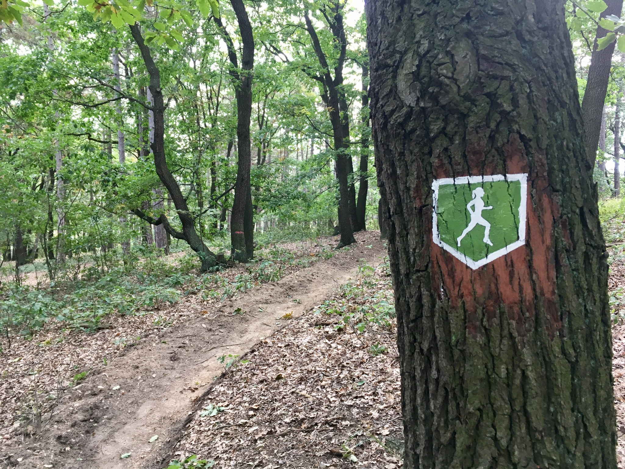 Značka na stomě stezky GreenRunner na kopci Ressl.